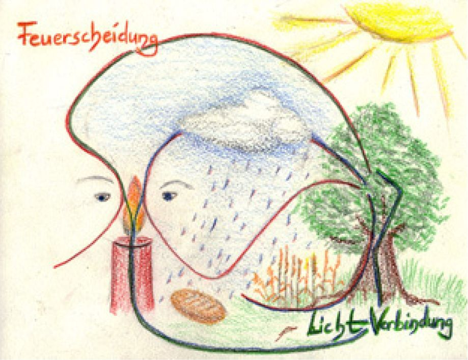 Der Kreislauf von Feuerscheidung und Lichtverbindung, Lehrstück Faradays Kerze, Susanne Wildhirt